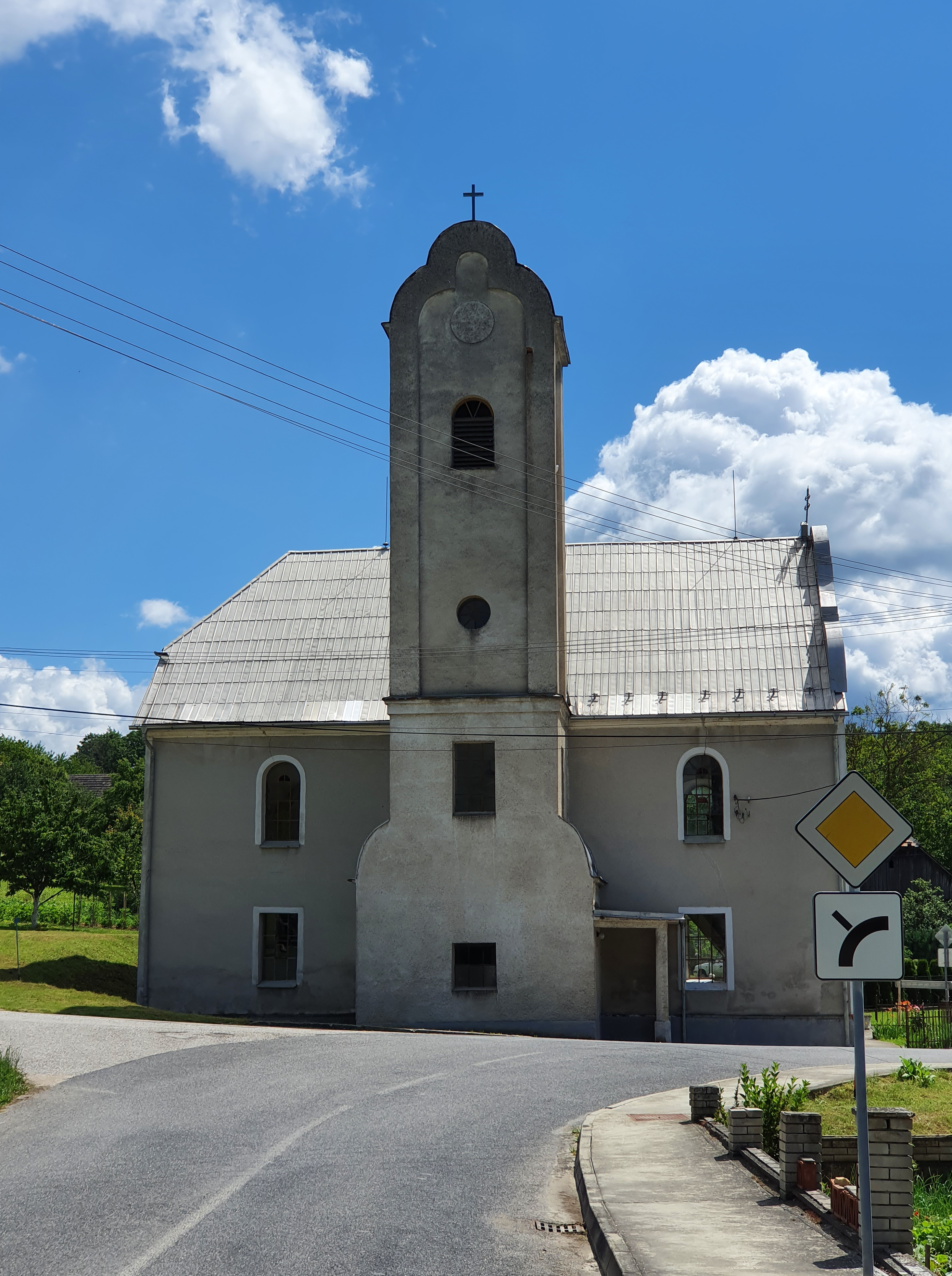 Evanjelický kostol v Bukovci